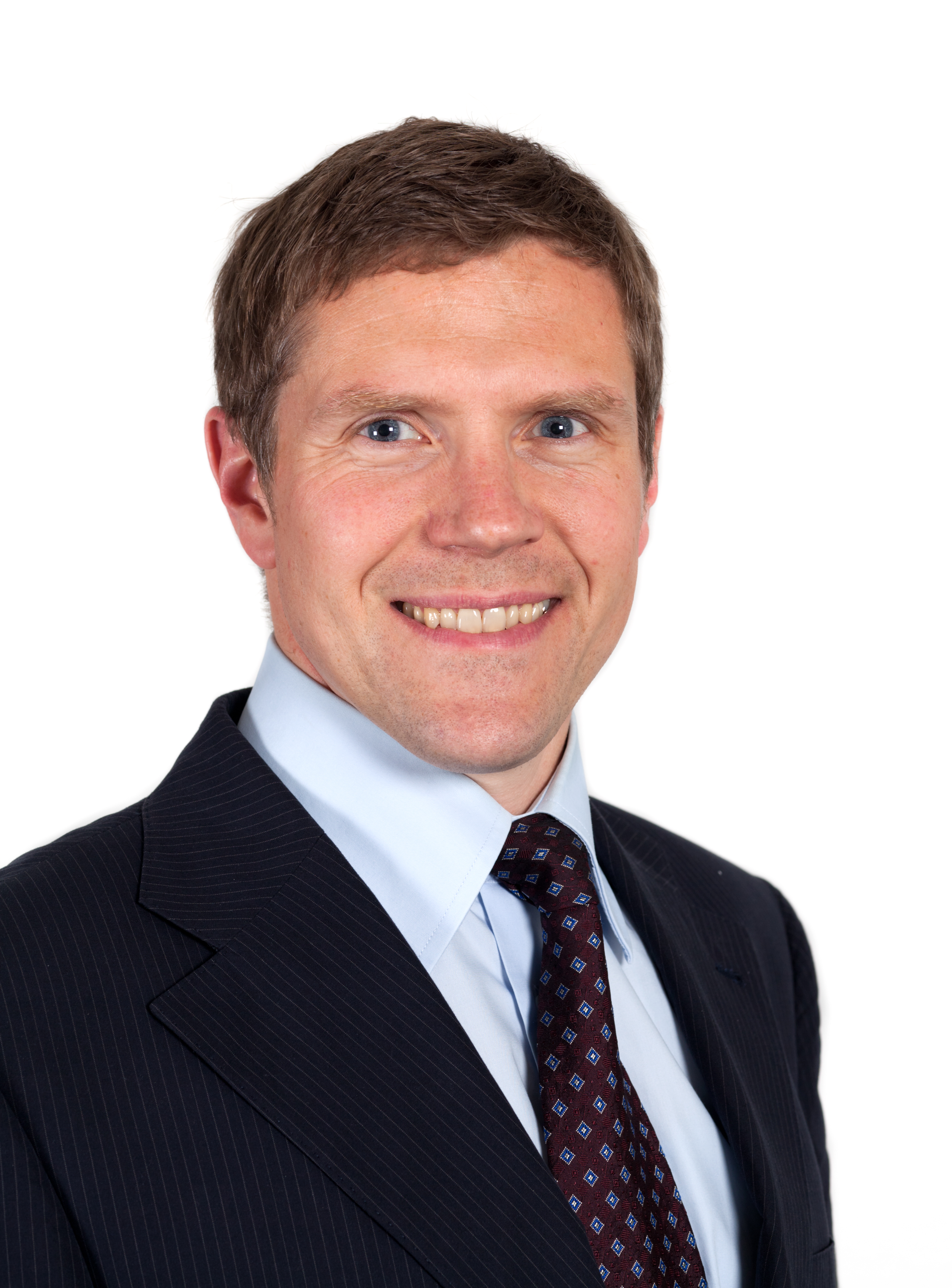 Poträtfoto von Jan Balcke (SPD), Mitglied der 20. Hamburgischen Bürgerschaft. Während des Projektes Hamburgische Bürgerschaft im Hamburger Rathaus.